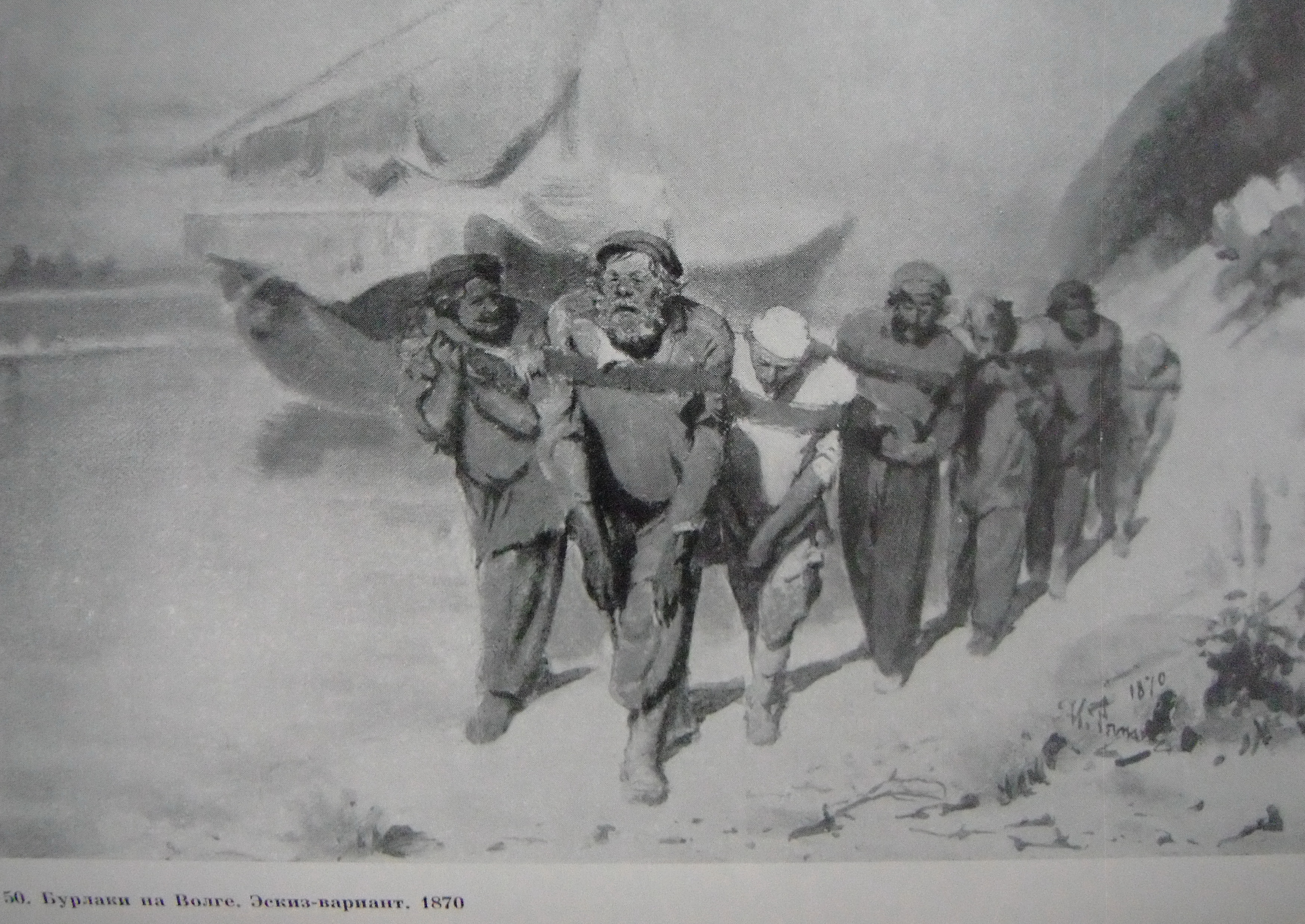 Эскизы к картине "Бурлаки на Волге"